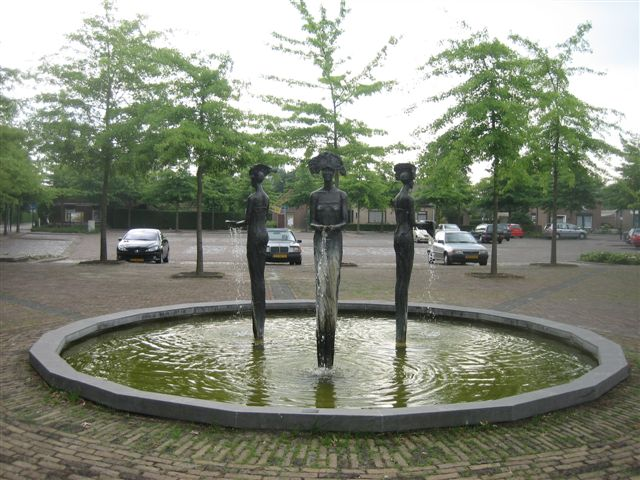 Vrouwen van de Bron in Wanroij, The Netherlands